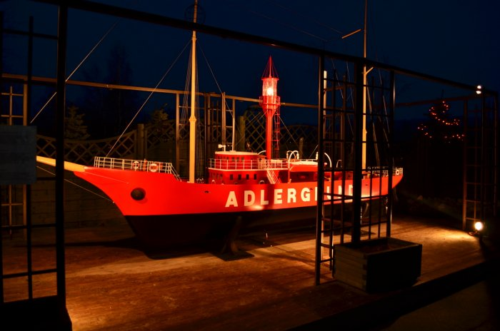 Latarniowiec Adlergrund (Ławica Orla)